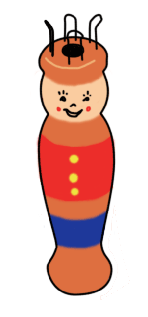 Bobentrikilo.